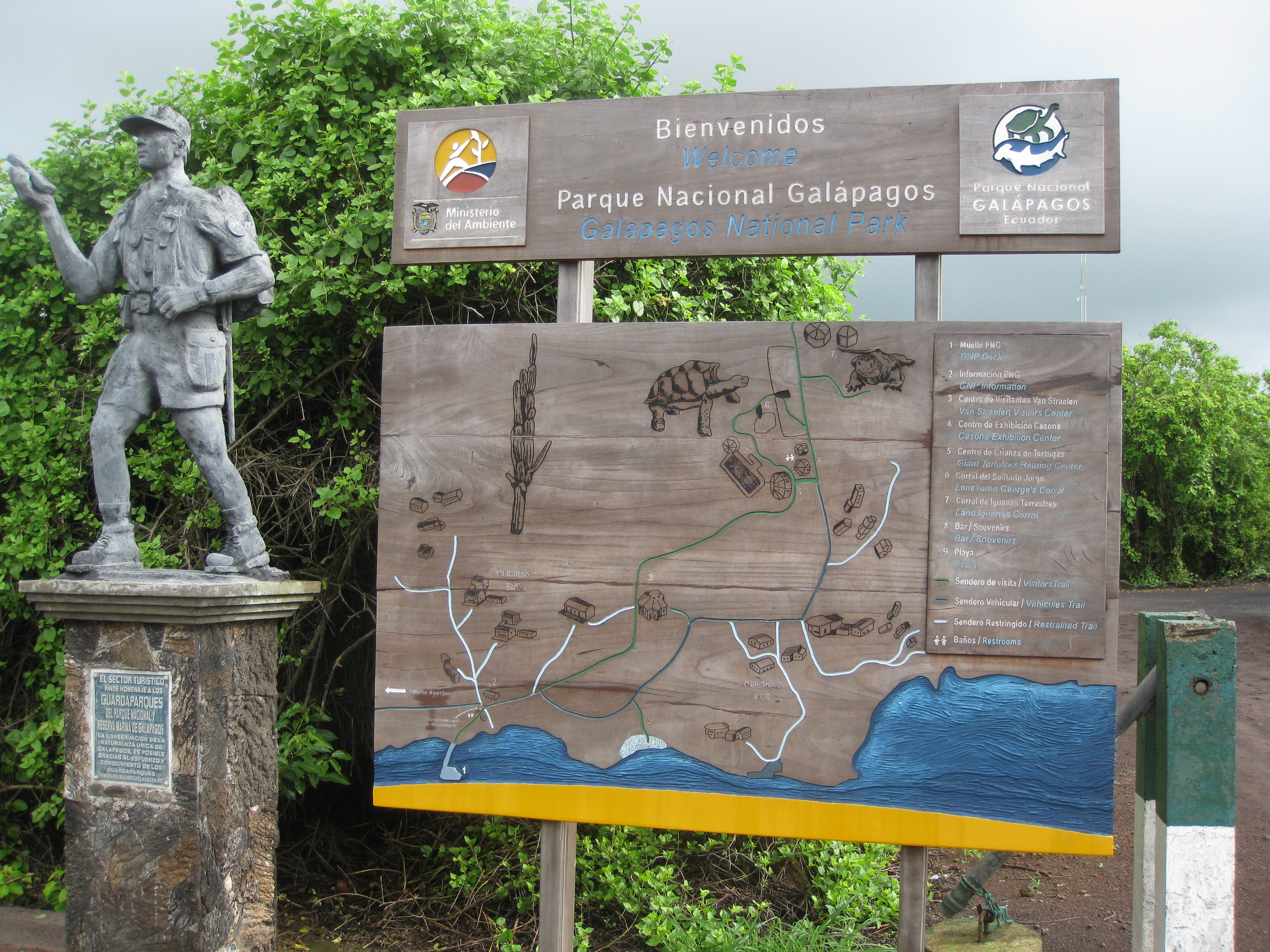 Galapagos February 2010 298